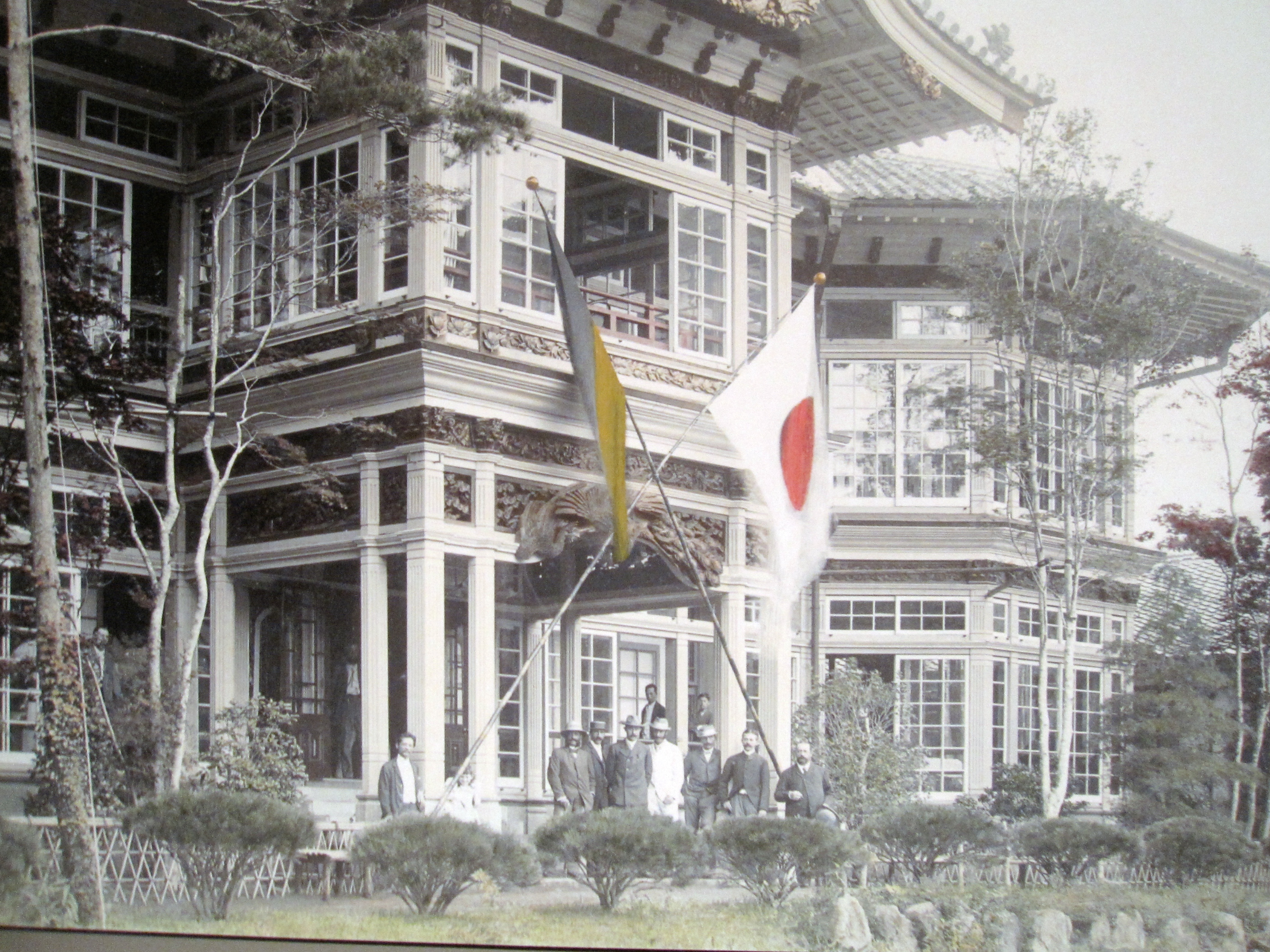 Photo aus dem ausgestellten Photoalbum der Sammlung Este. Erzherzog Franz Ferdinand mit Begleitung vor dem Fujiya-Hotel in Miyanoshita, Hakone-Gebirge, 16. August 1893 (2 v.r. Heinrich von Sieboldt)